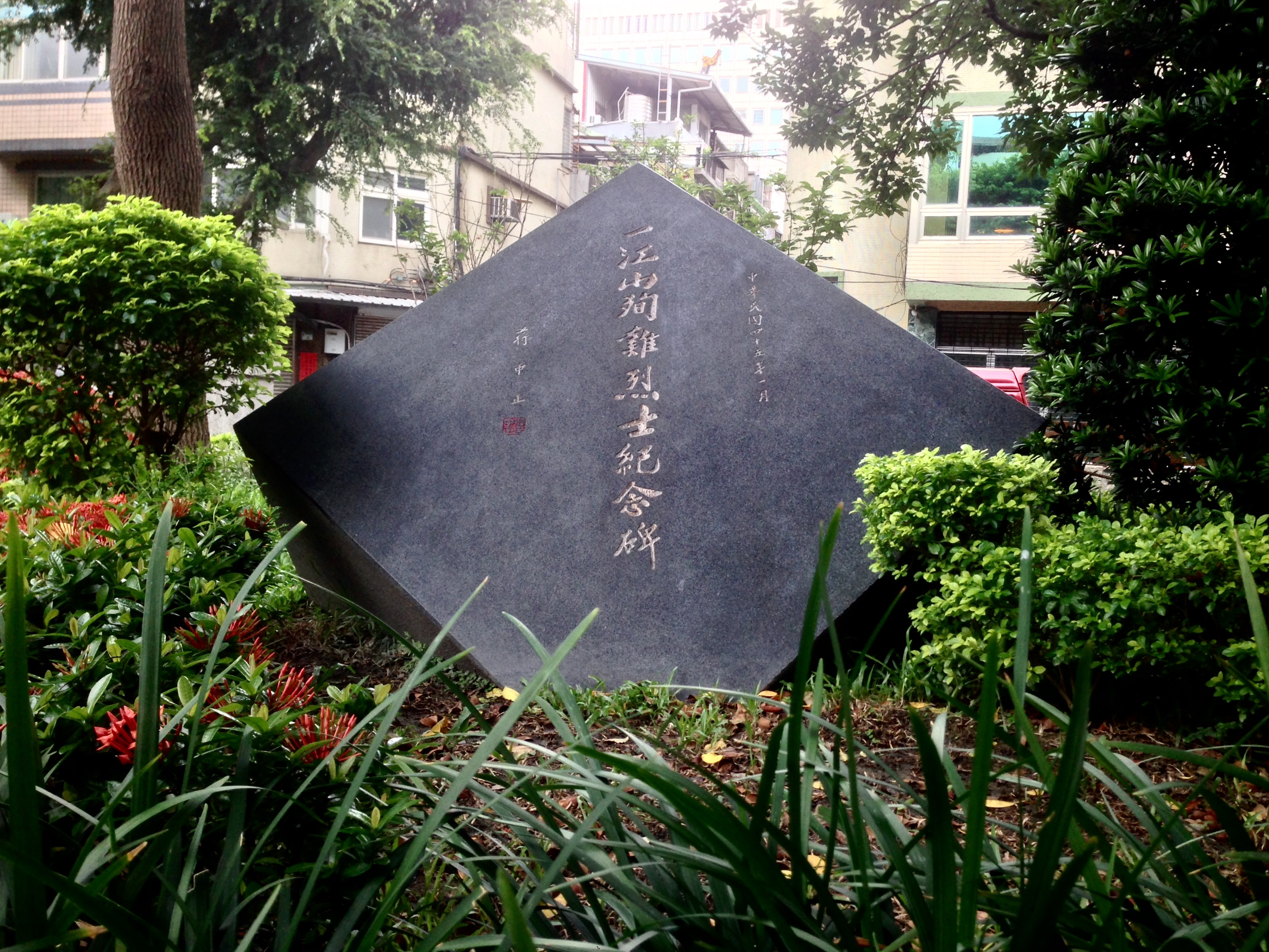 中文（台灣）: 台北市中山區一江公園一江島殉難烈士紀念碑